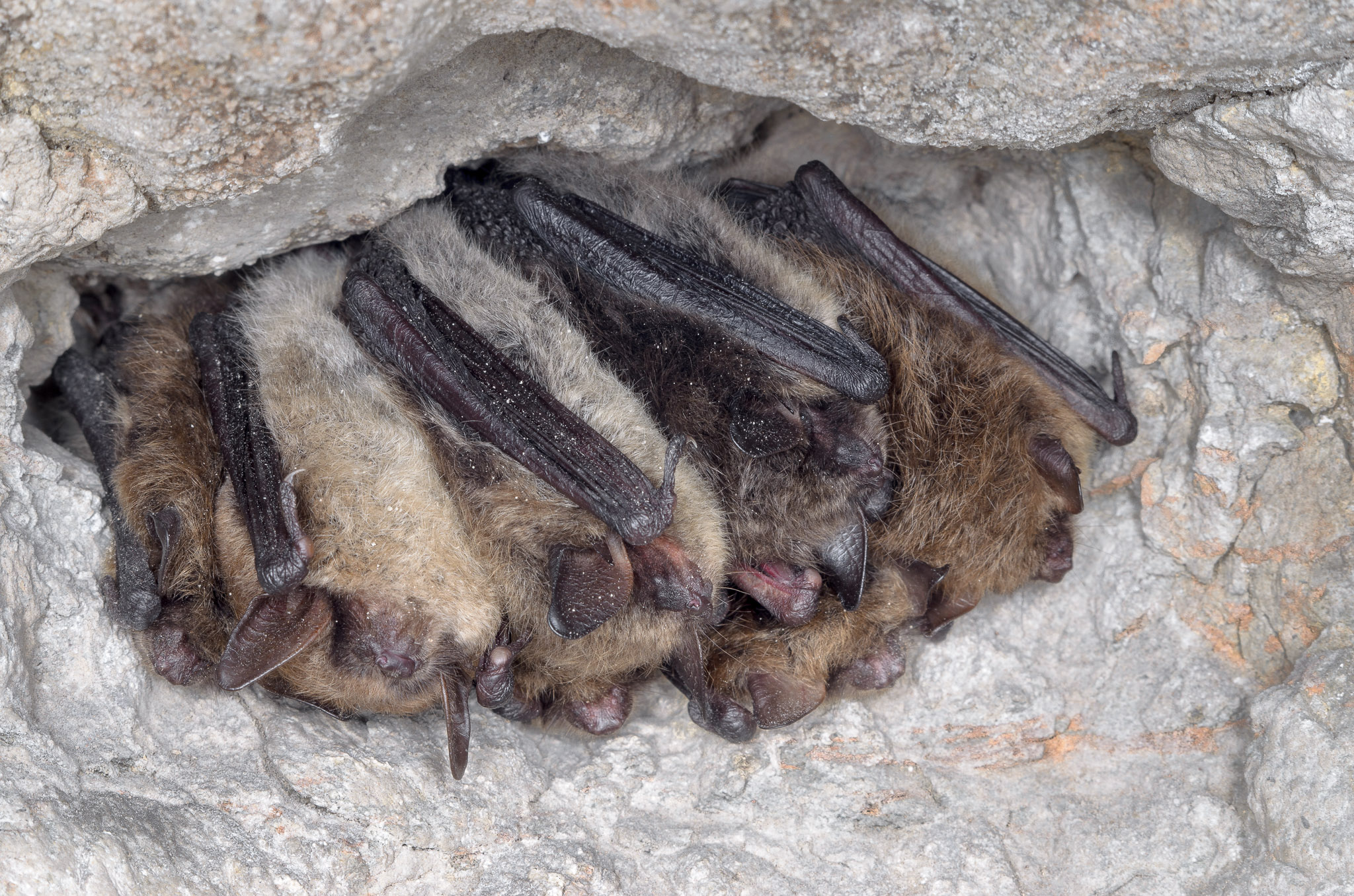 Talvituvad tõmmulendlased